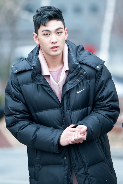 160312 白虎